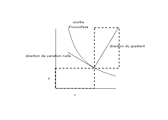 é‰tude du gradient de surface - image personnelle - licence GFDL